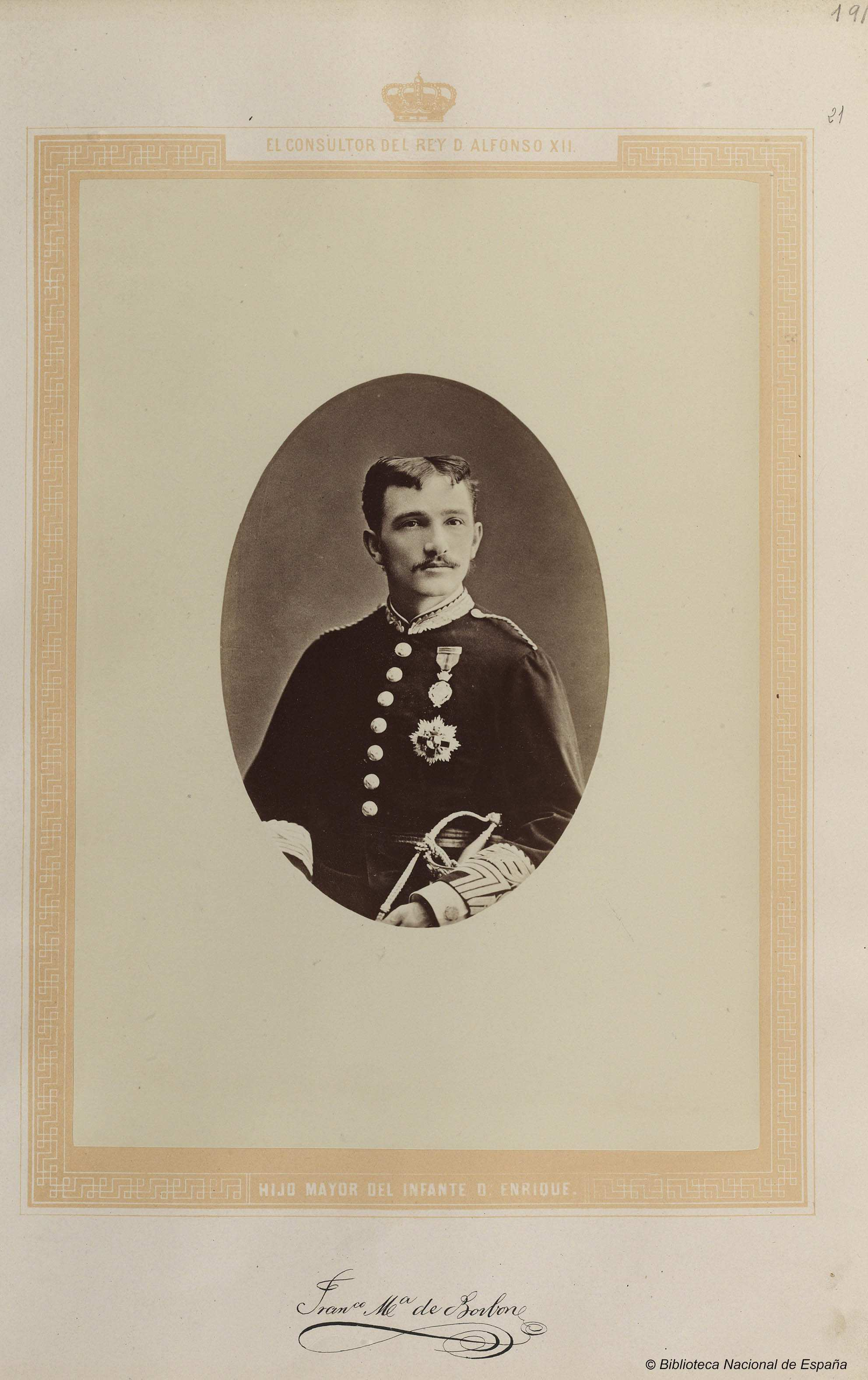 Retrato de Francisco María de Borbón y Castellví. Fotografía sobre papel albúmina de Imprenta y Librería Religiosa y Científica del Heredero de Pablo Riera. Barcelona. Inscripción: El consultor del rey don Alfonso XII. Facsímil de la firma: Francº Mª de Borbon